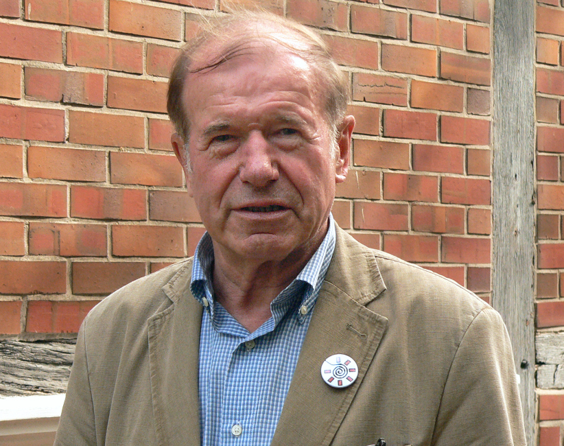 Wolfgang Meibeyer bei der Eröffnungsveranstaltung zum Tag des Denkmals in Niedersachsen 2015 am 13. September 2015 in Schreyahn, am Revers das Logo des Rundlingsvereins